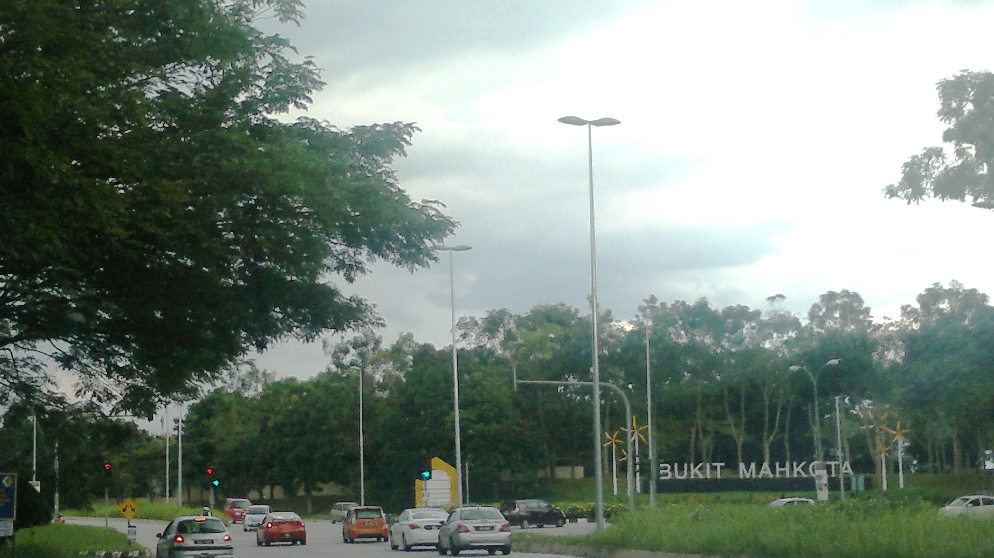 Kajang, Selangor, Malaysia